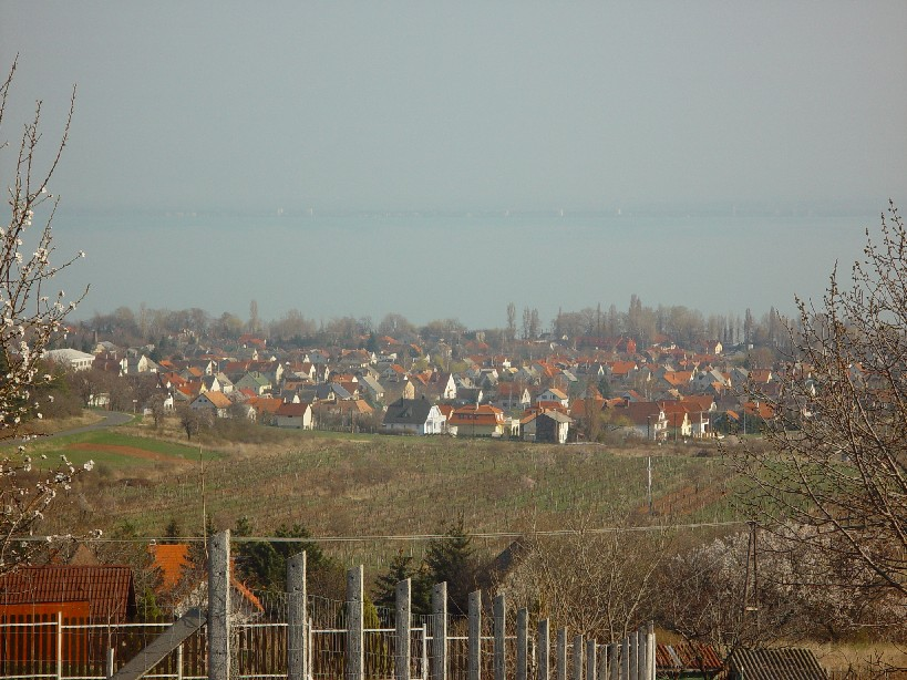 Alsóörs látképe Saját felvétel